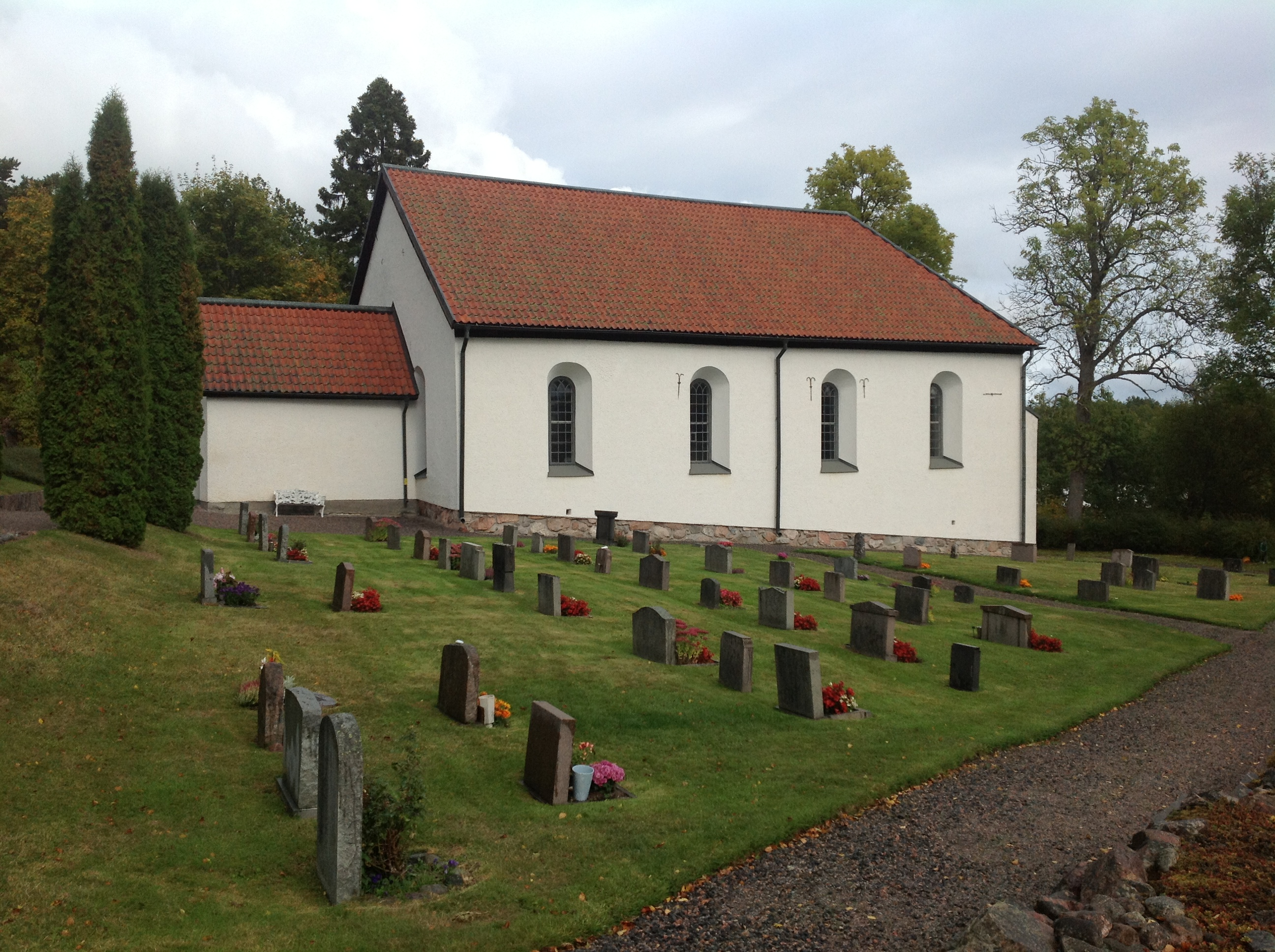 Rönö kyrka, Linköpings stift